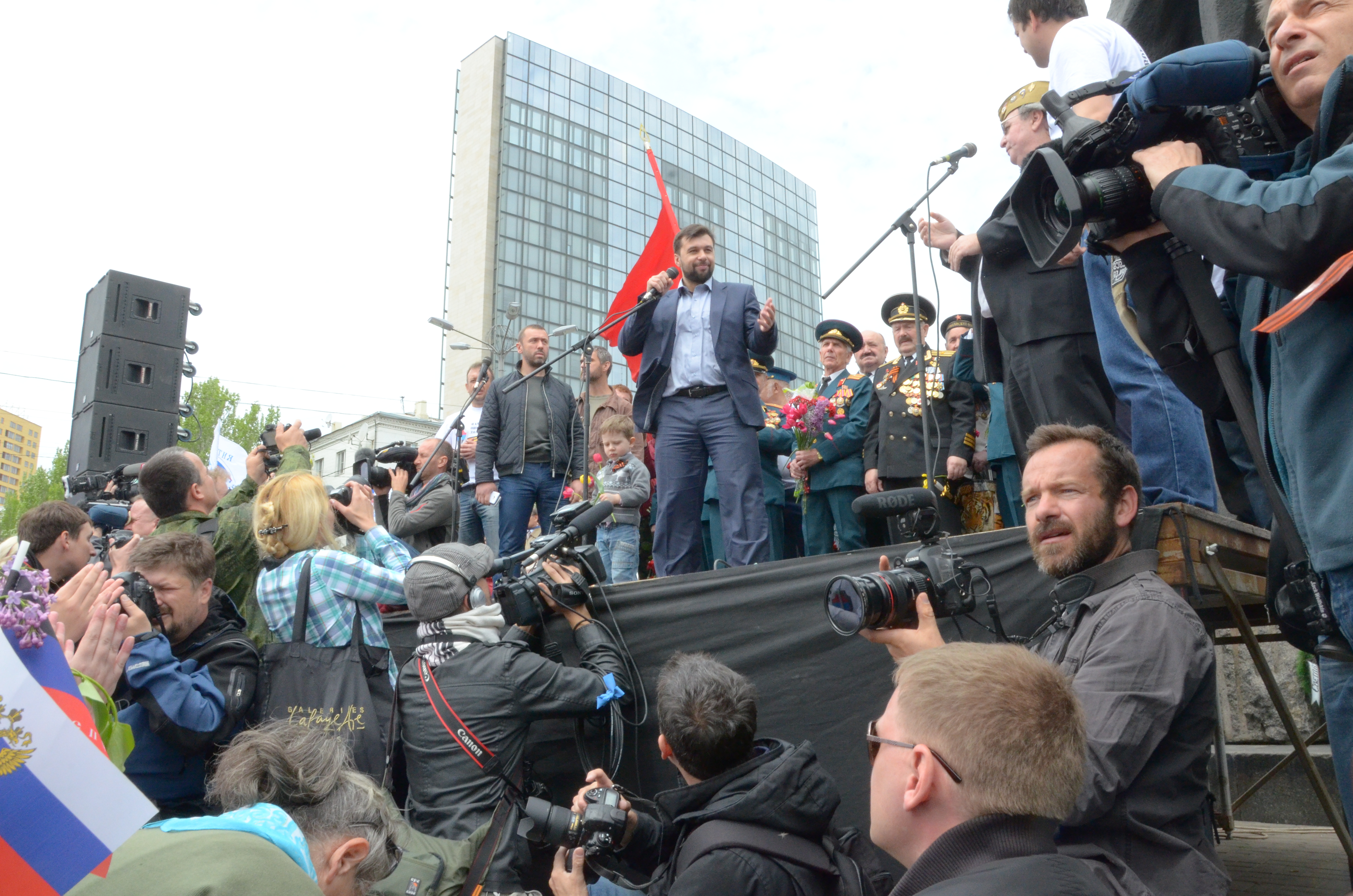 День Победы в Донецке